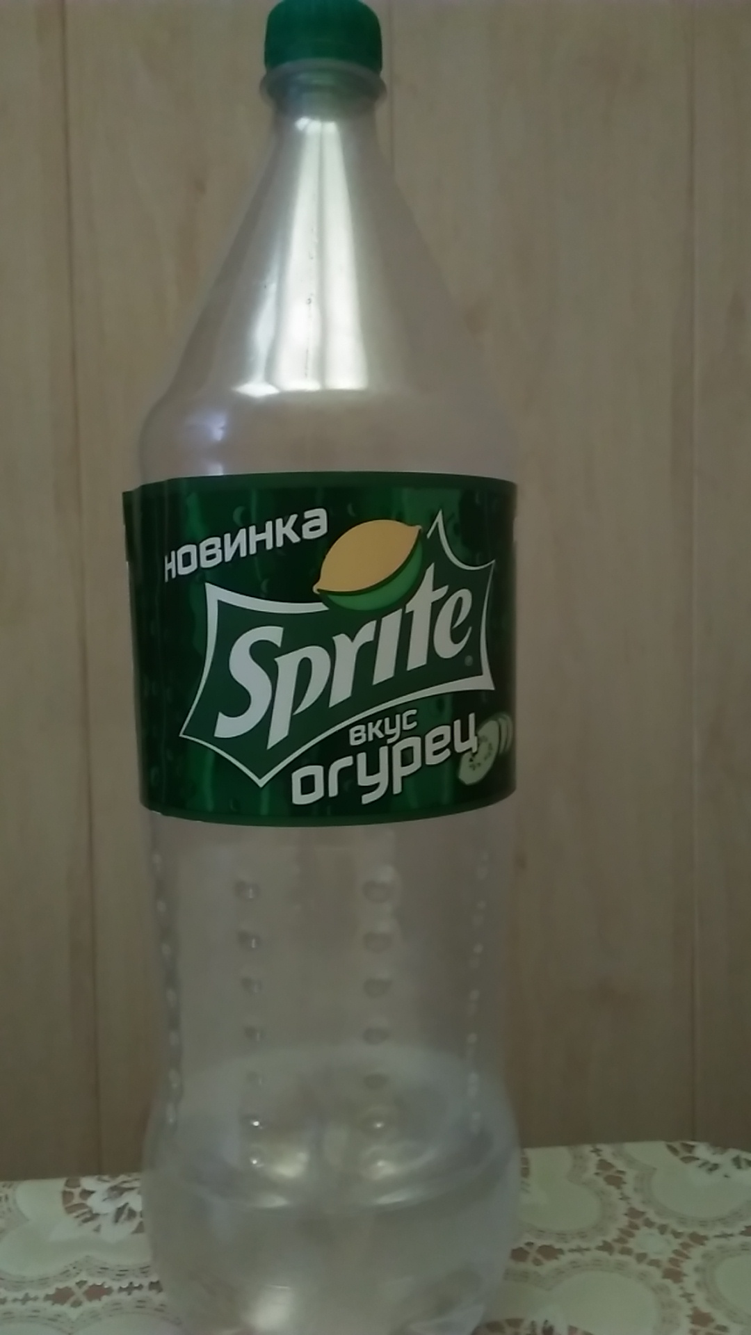 Sprite Огурец